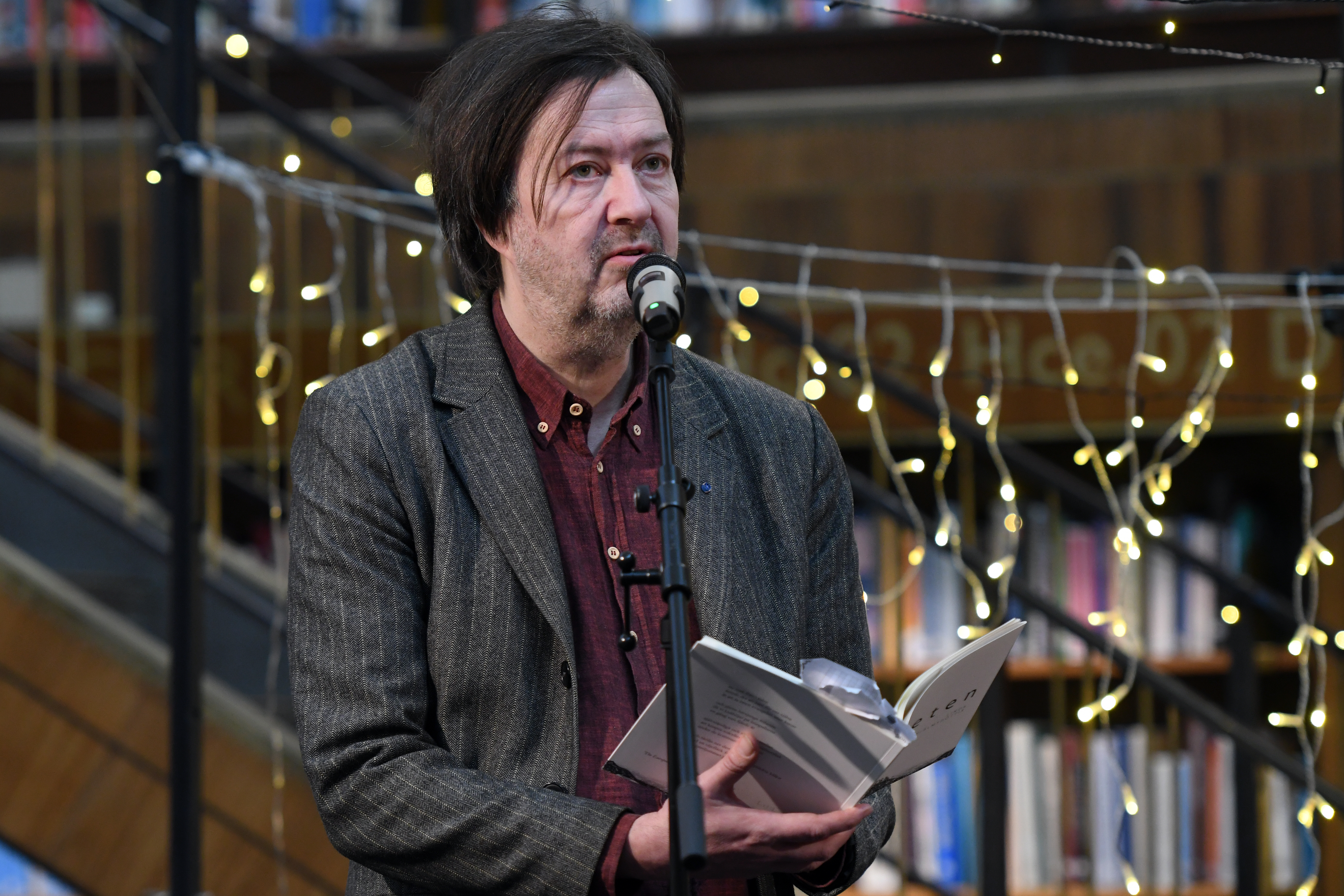 Poesimässan 2019, Stockholms stadsbibliotek. John Swedenmark läser ur sin översättning av Linda Vilhjálmsdóttir diktning.